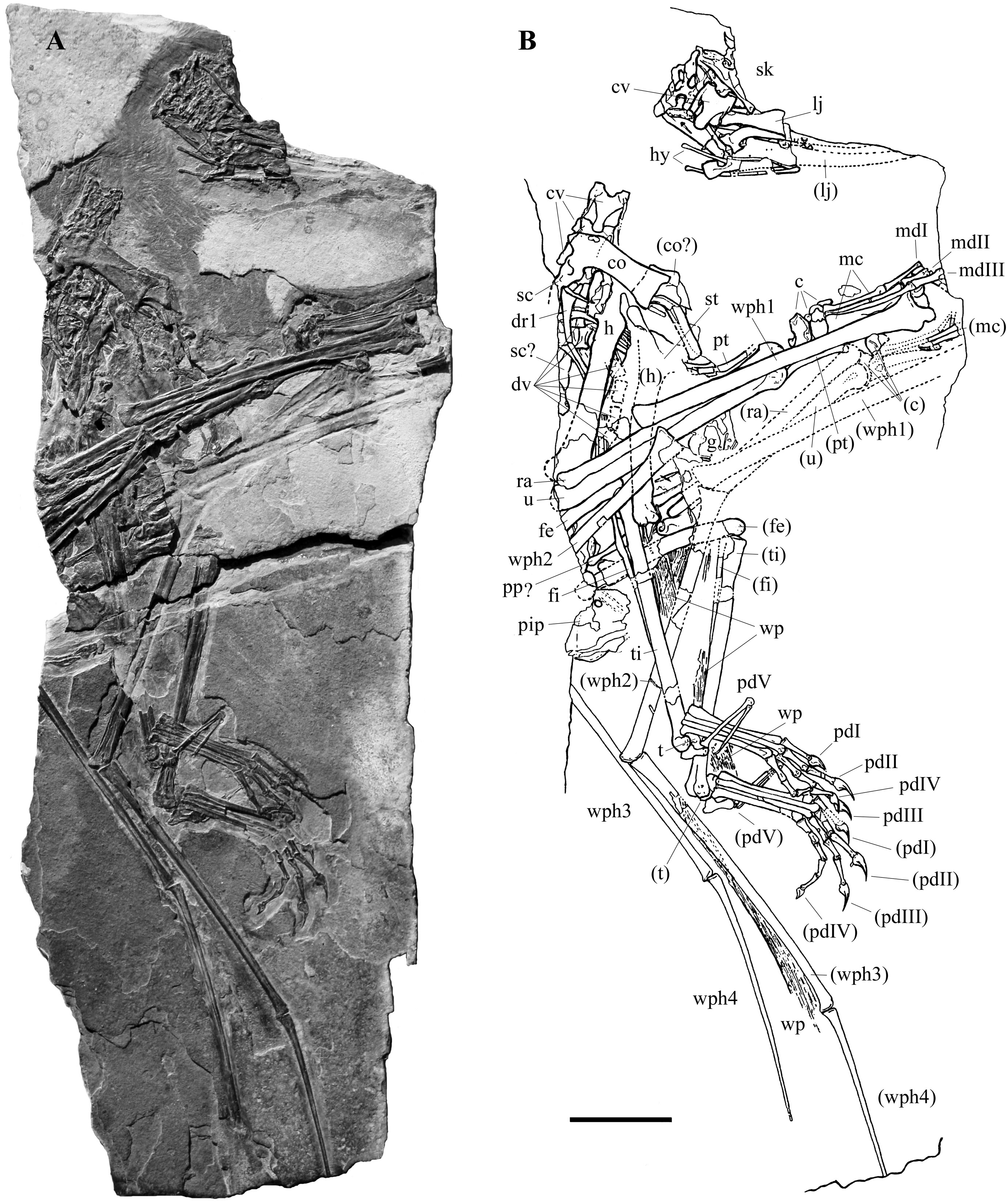 Carniadactylus rosenfeldi holotype.